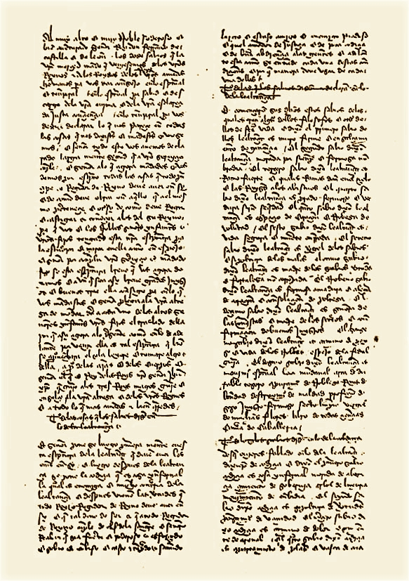 Libro_de_los_doze_sabios, ms. 12733 Biblioteca Nacional de España, f.99r